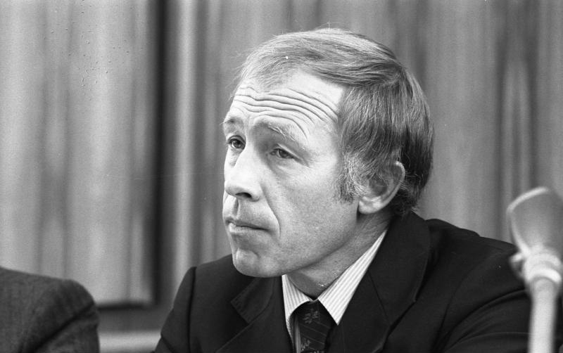 Pressekonferenz mit Mitgliedern des CDU-Präsidiums im Tulpenfeld, Bonn (Heinrich "Heiner" Geißler)